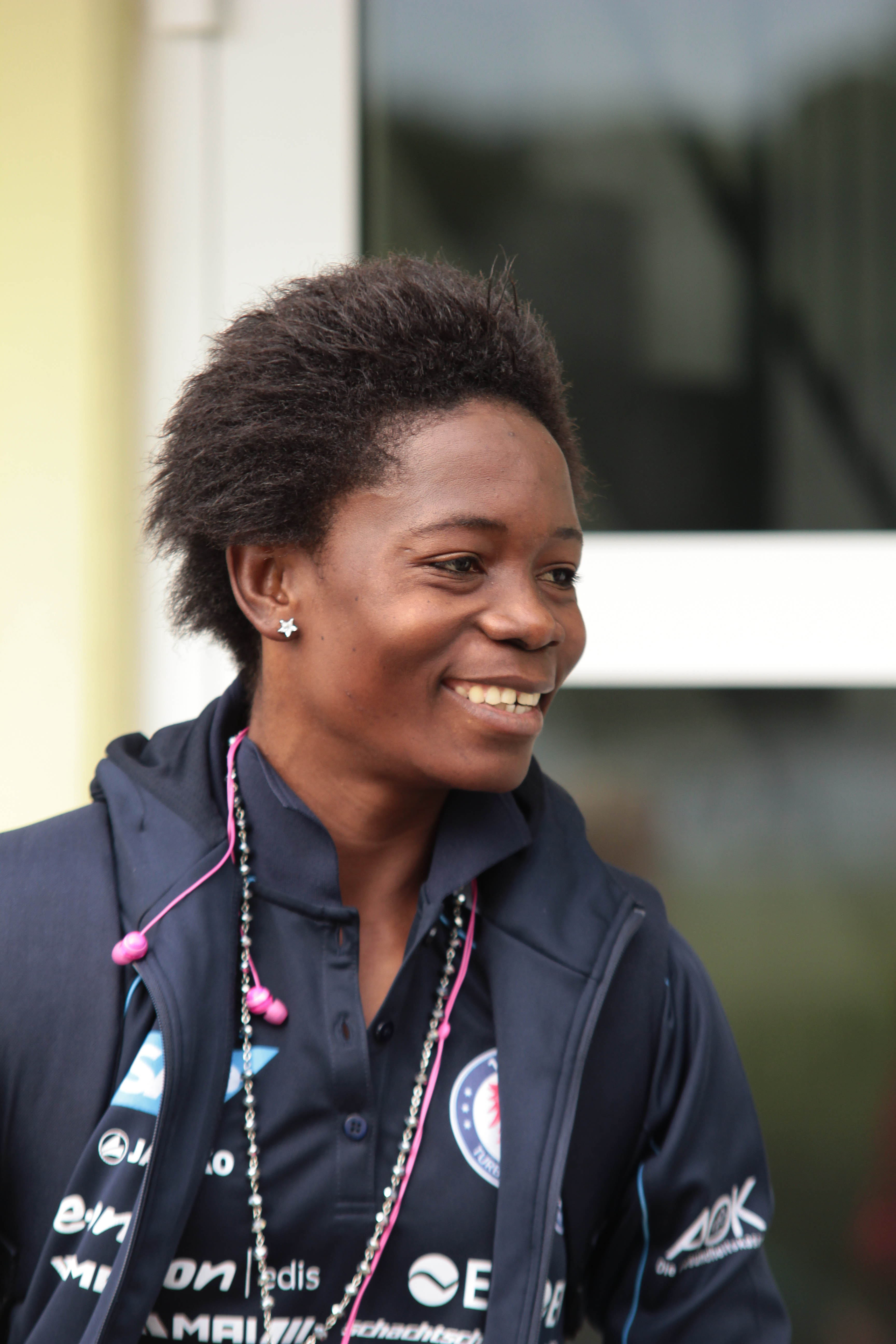 Equatoguinean footballer Genoveva Añonma, 1. FFC Turbine Potsdam